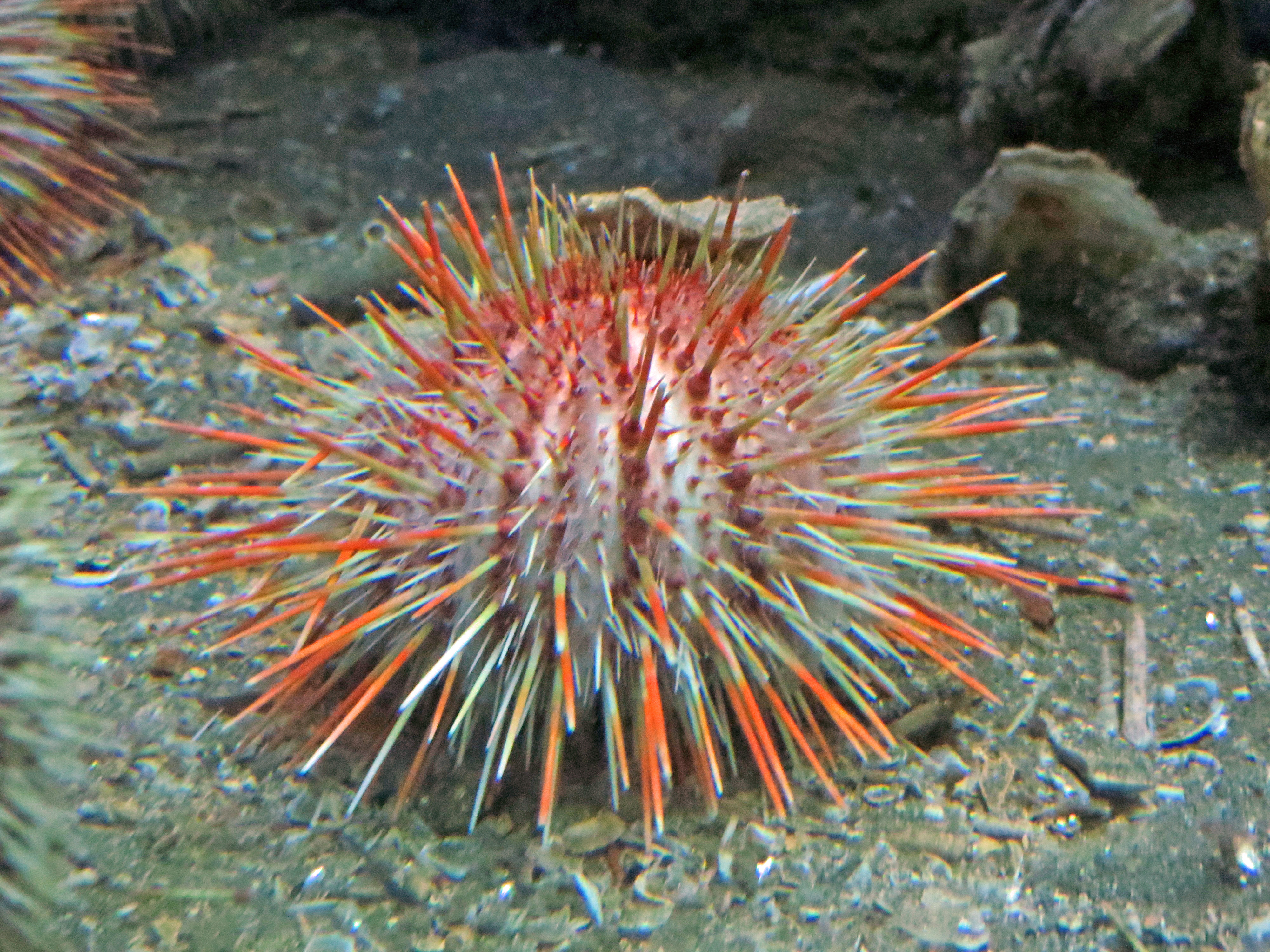 Un oursin pointu Gracilechinus acutus au Biodiversarium de l'Observatoire océanographique de Banyuls-sur-mer. (identification : Frédéric Ducarme & Andreas Kroh).